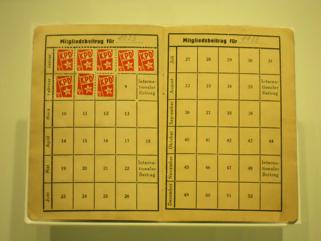 Mitgliedsbuch der KPD von Annemarie Tillman, 1933